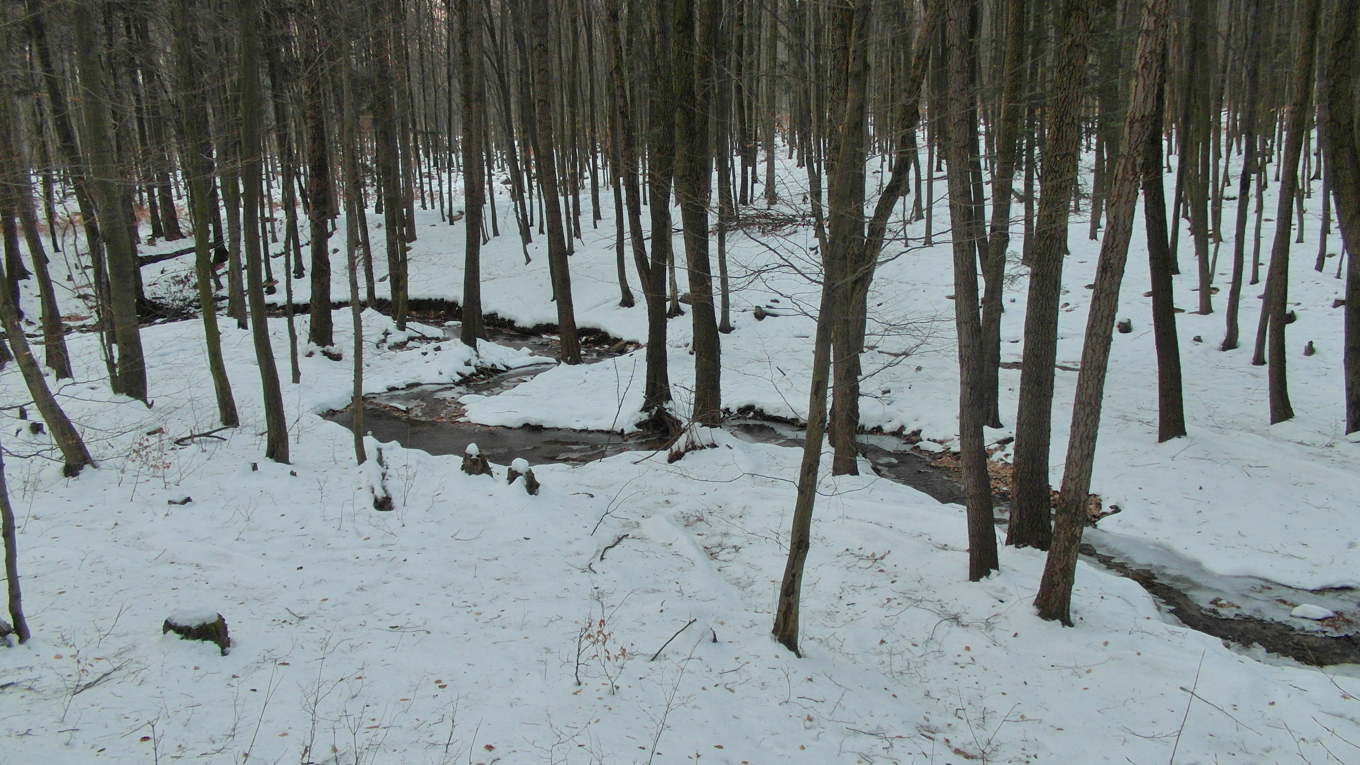 90° ZÁKRUTY V POTOKU - 90° BENDS IN THE BROOK